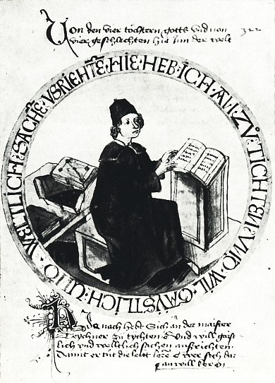 Dichter Heinrich der Teichner. Getuschte Federzeichnung.